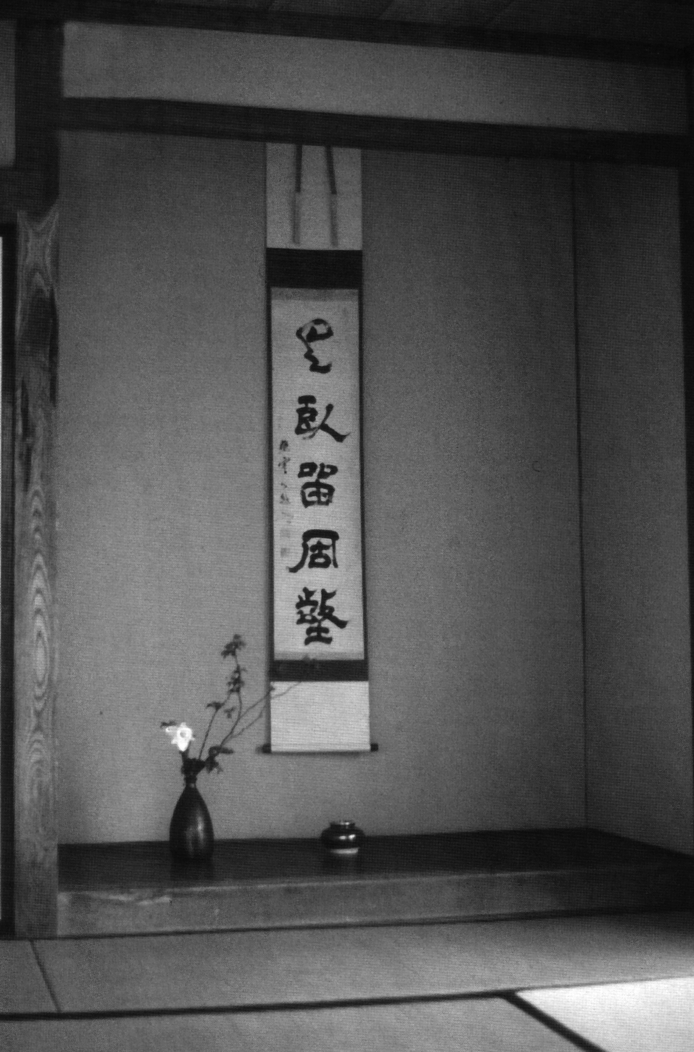 Tokonoma im Shenshintei genannten Gebäude beim Tempel Shorin-zan im japanischen Takasaki. Lage: 36.330253 N, 138.958149 O